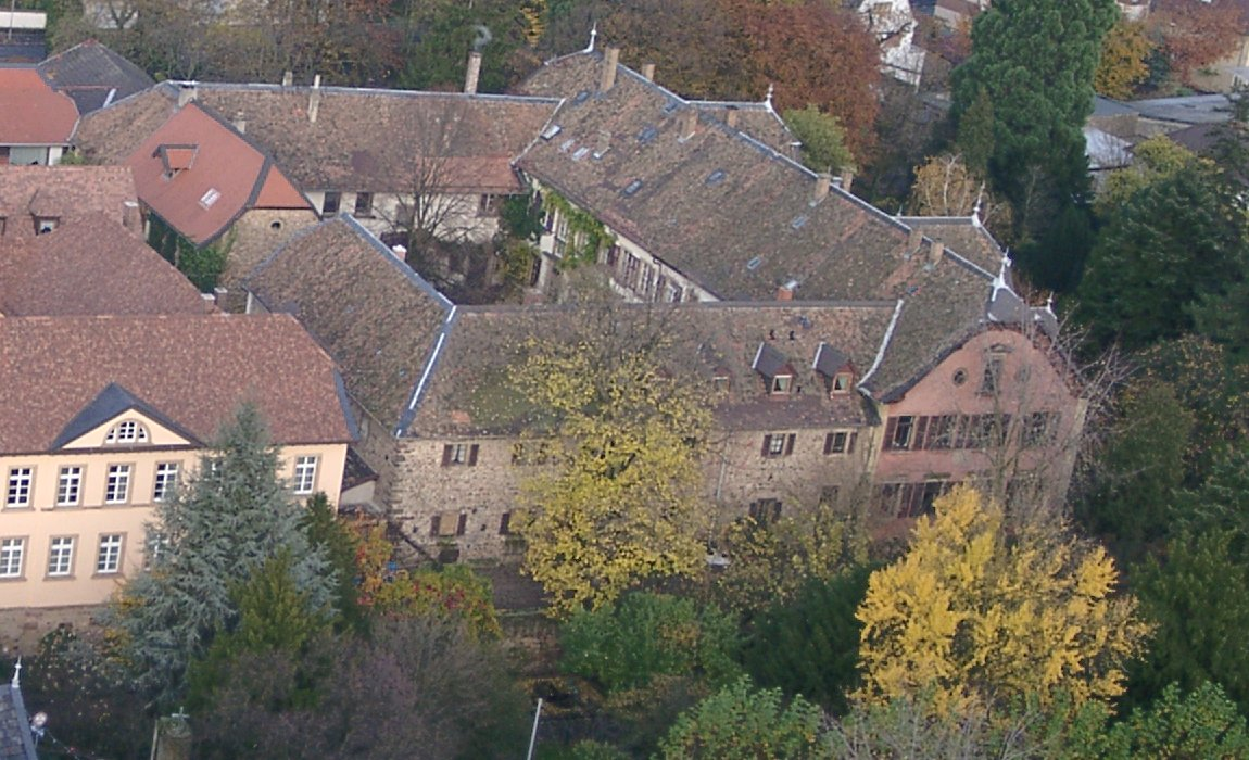 Das Deidesheimer Schloss aus der Vogelperspektive